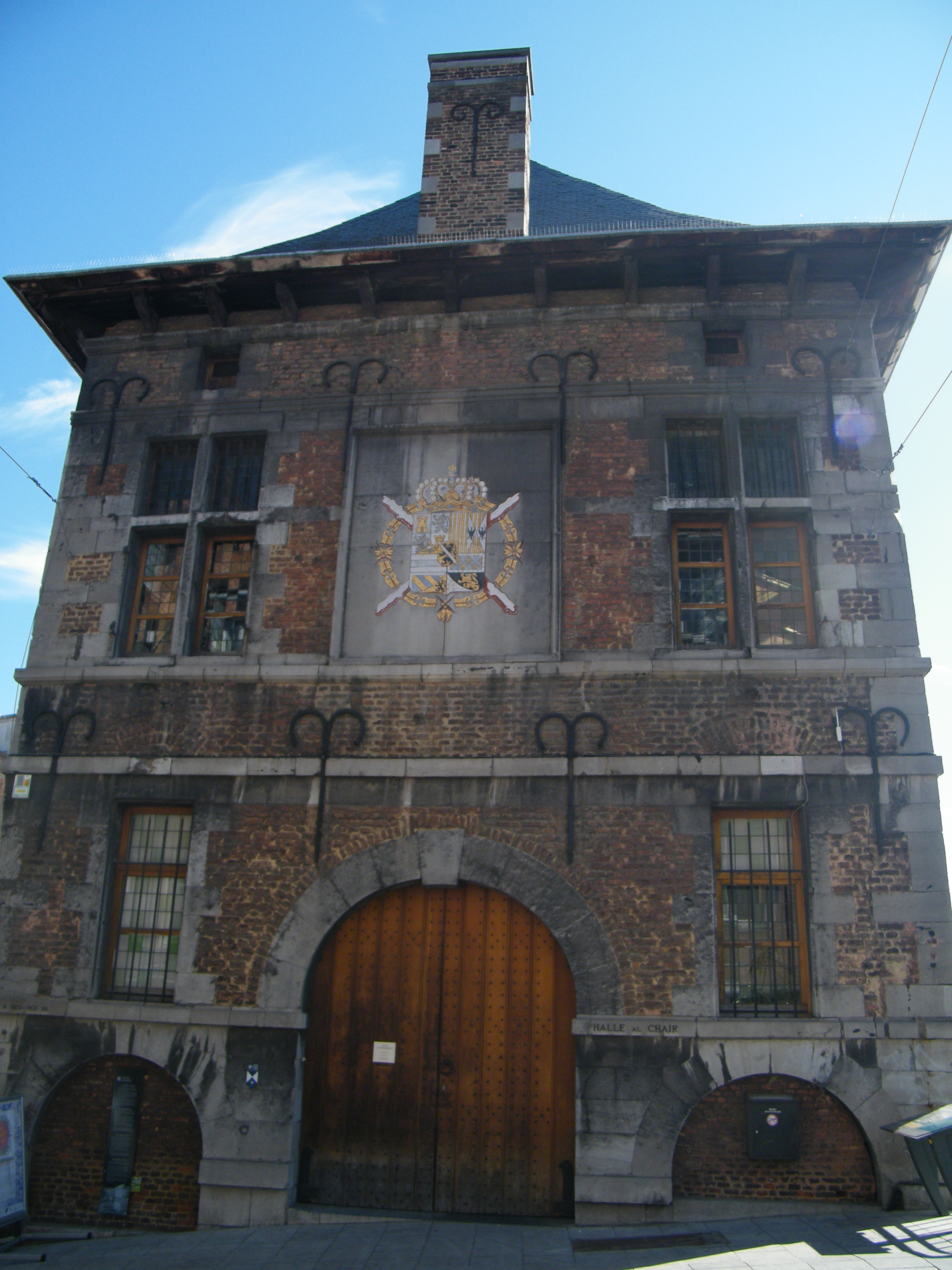 Musée Archéologique, ancienne boucherie et Halle al'Chair